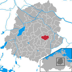 Gültz, Landkreis Demmin, Mecklenburg-Vorpommern